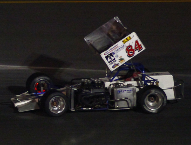 Mike Litchy à l'Autodrome Chaudière le 22 juin 2013 - Photo Paul-Émile Poulin-Jacques